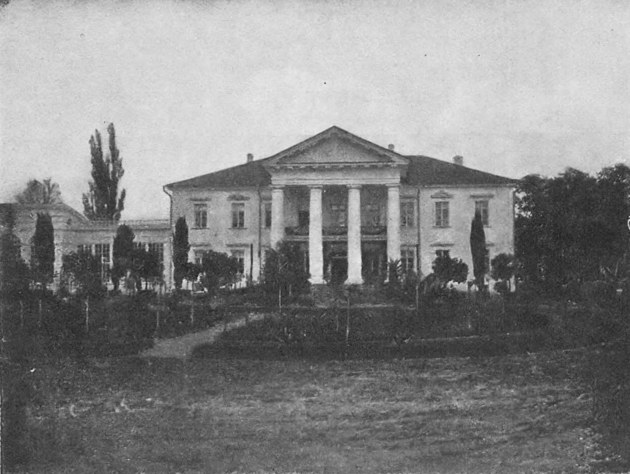 Беларуская (тарашкевіца): Барбароў (Barbaroŭ), сядзіба Горватаў (Horvat)